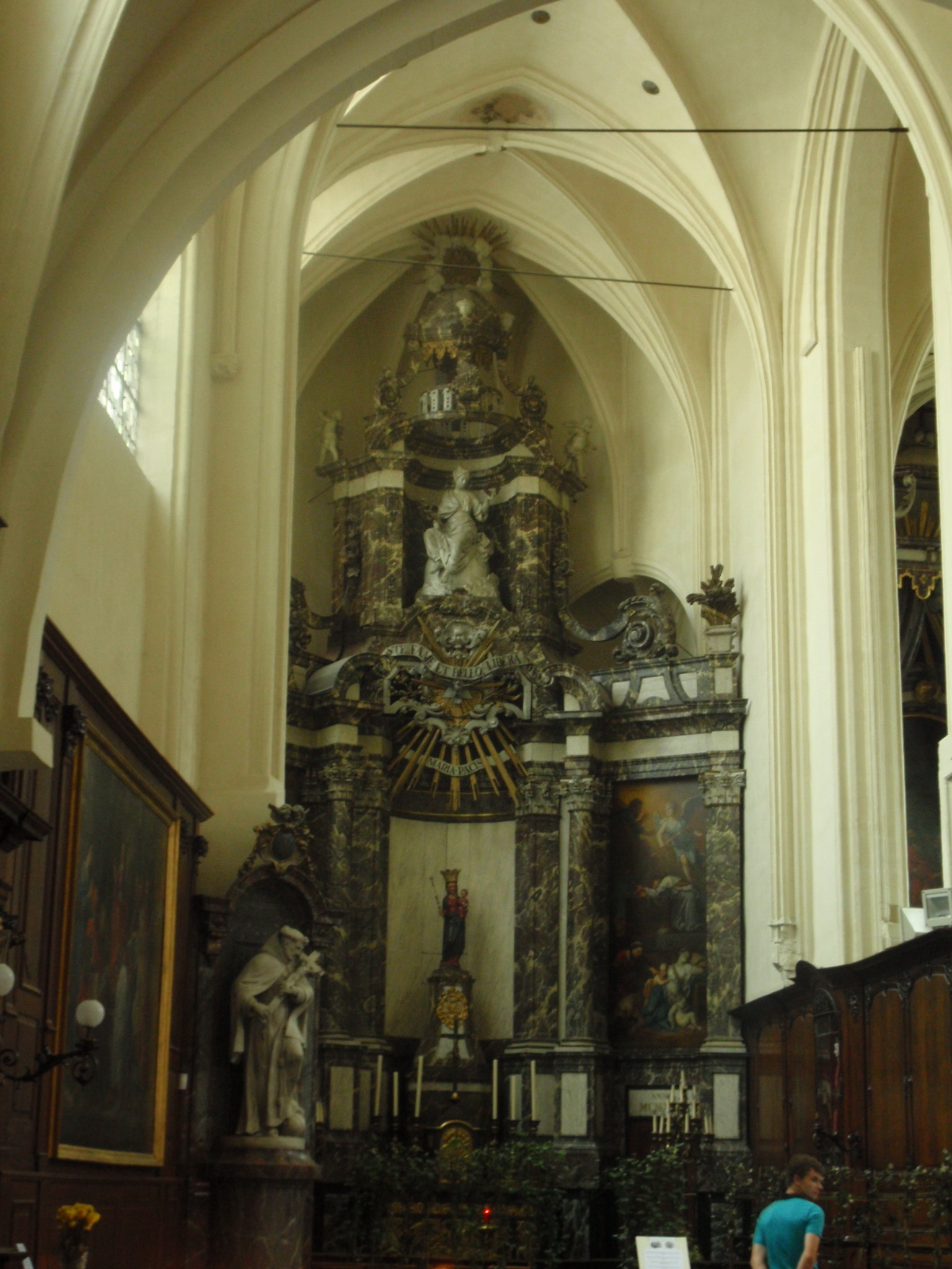 Интерьер церкви Святого Николая в Брюсселе